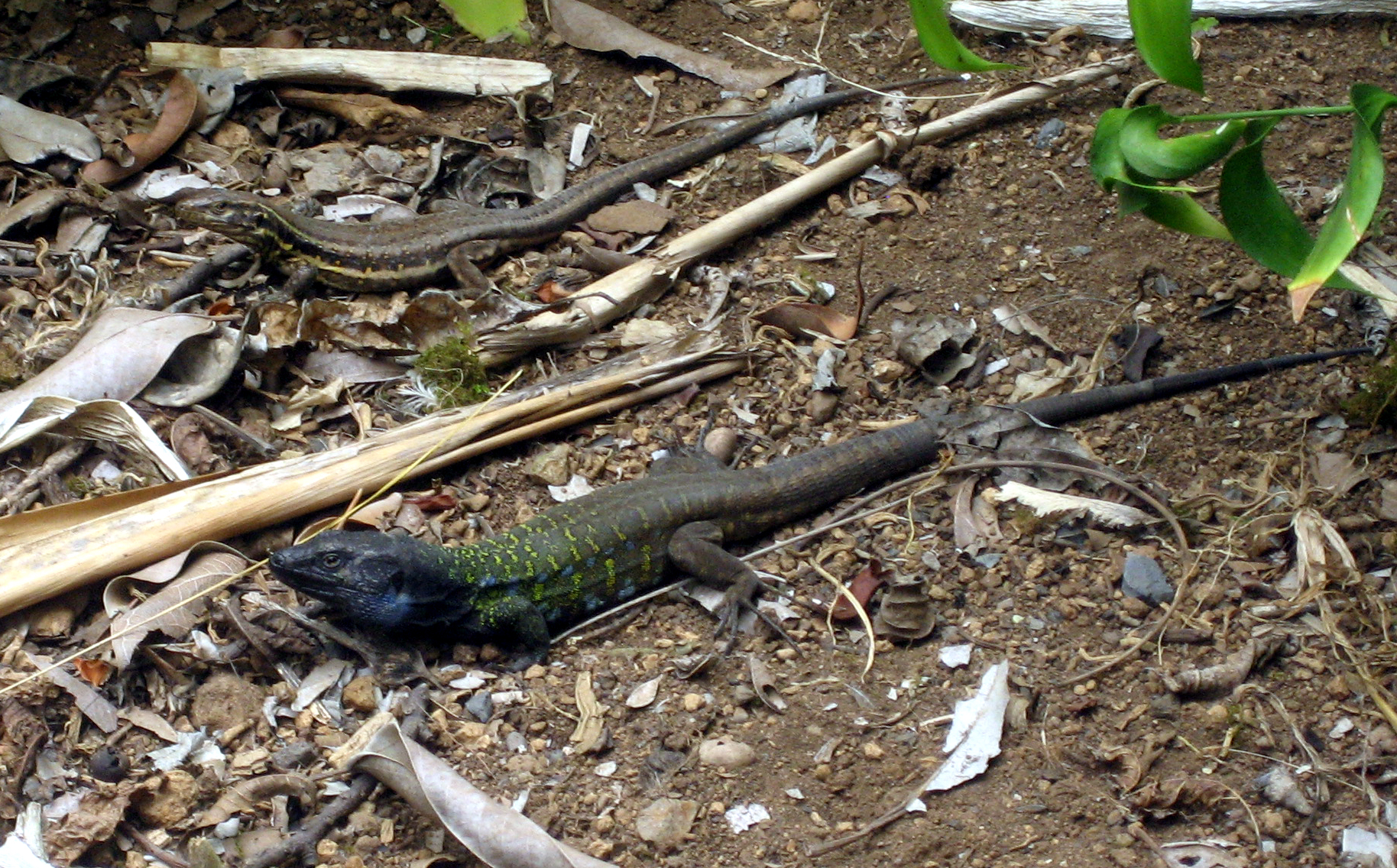 Gallotia galloti. Endèmic de Tenerife. Canàries.